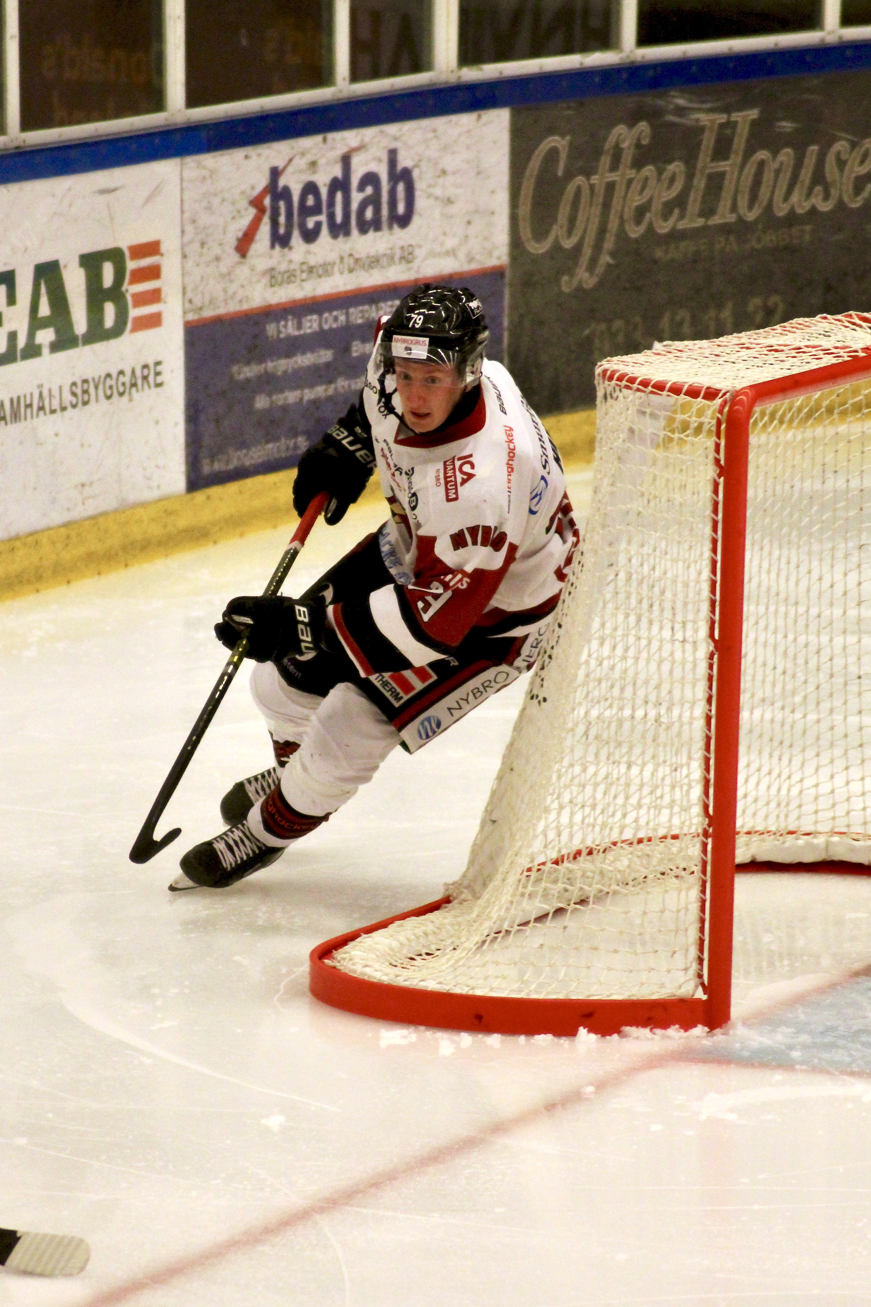 Matchdata på